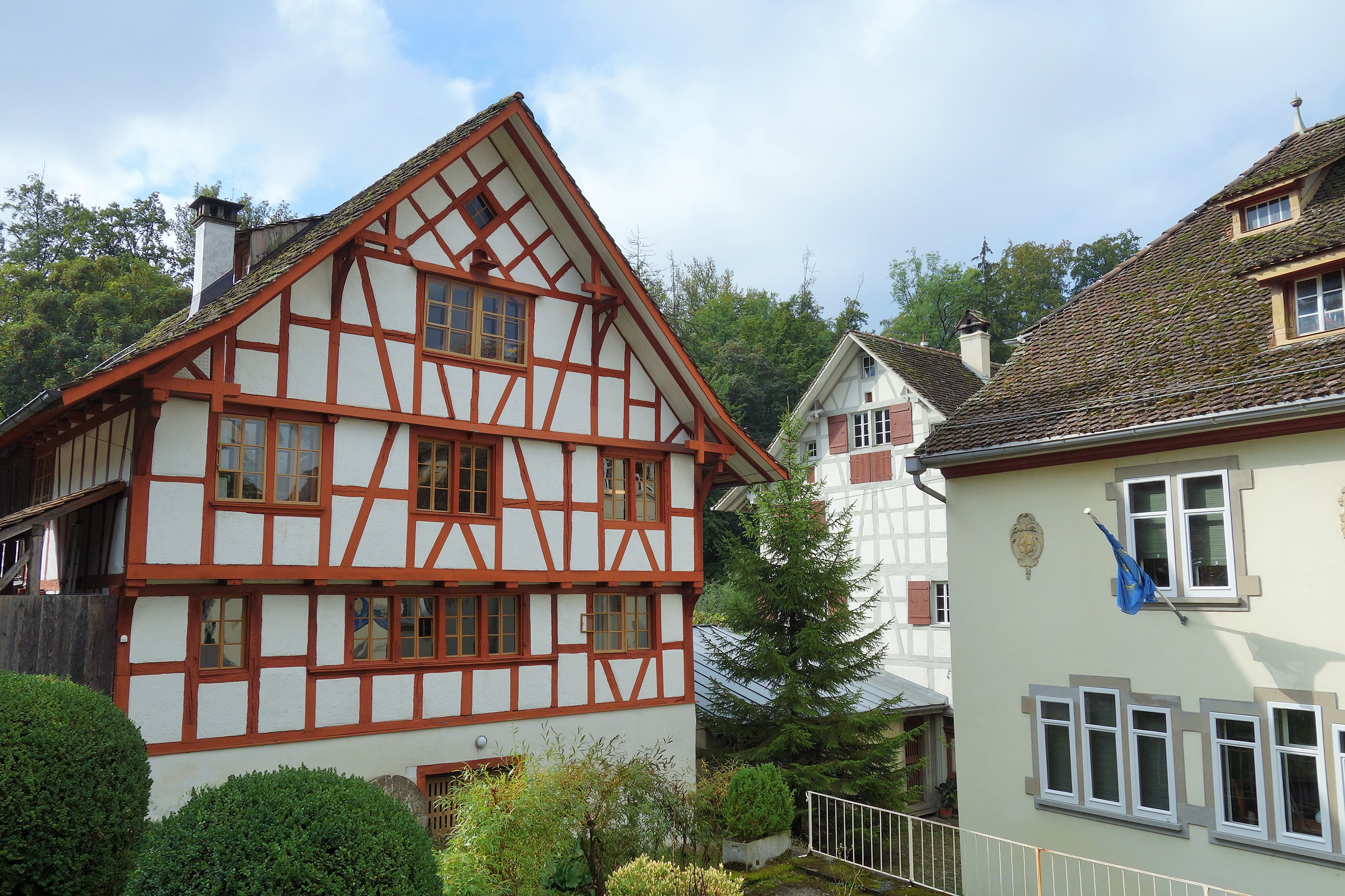 Häusergruppe Mühle Hirslanden, Zürich, Schweiz